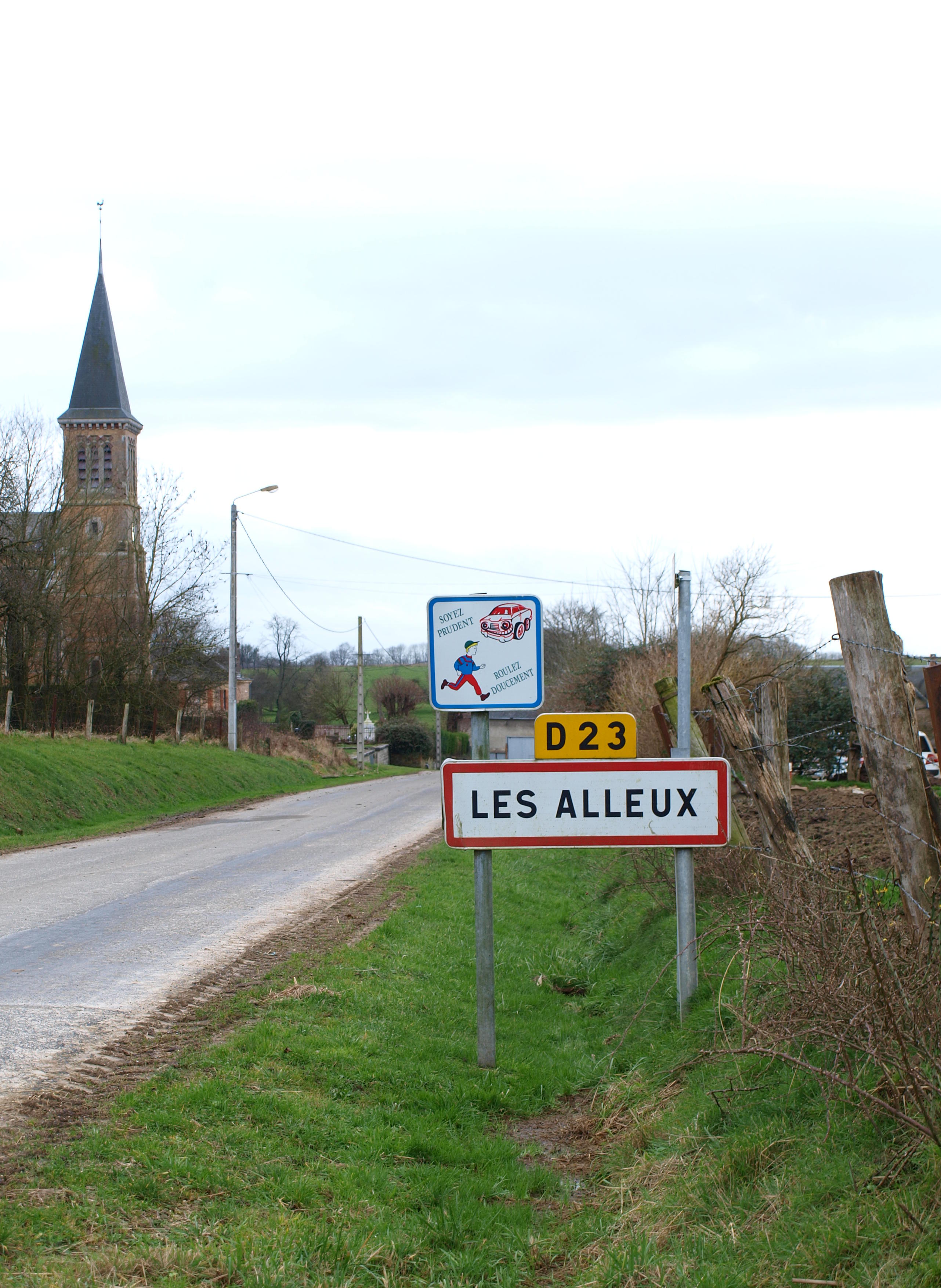 Les Alleux (Ardennes, France) ; panneau d'agglomération.